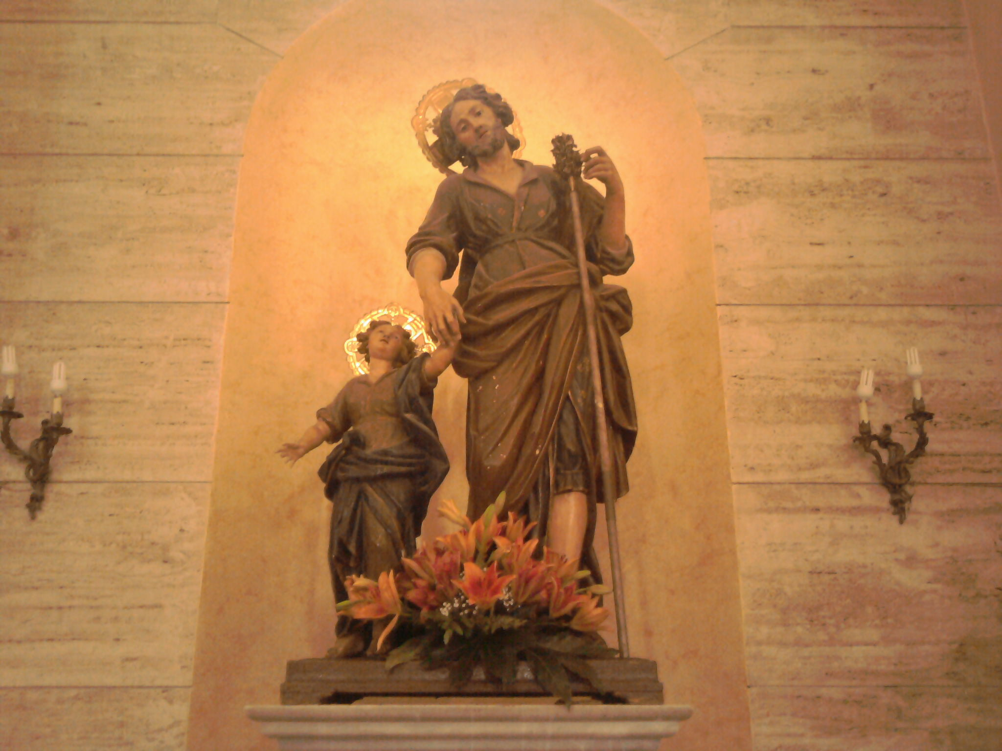 La statua di San Giuseppe collocata nella Concattedrale di Palmi